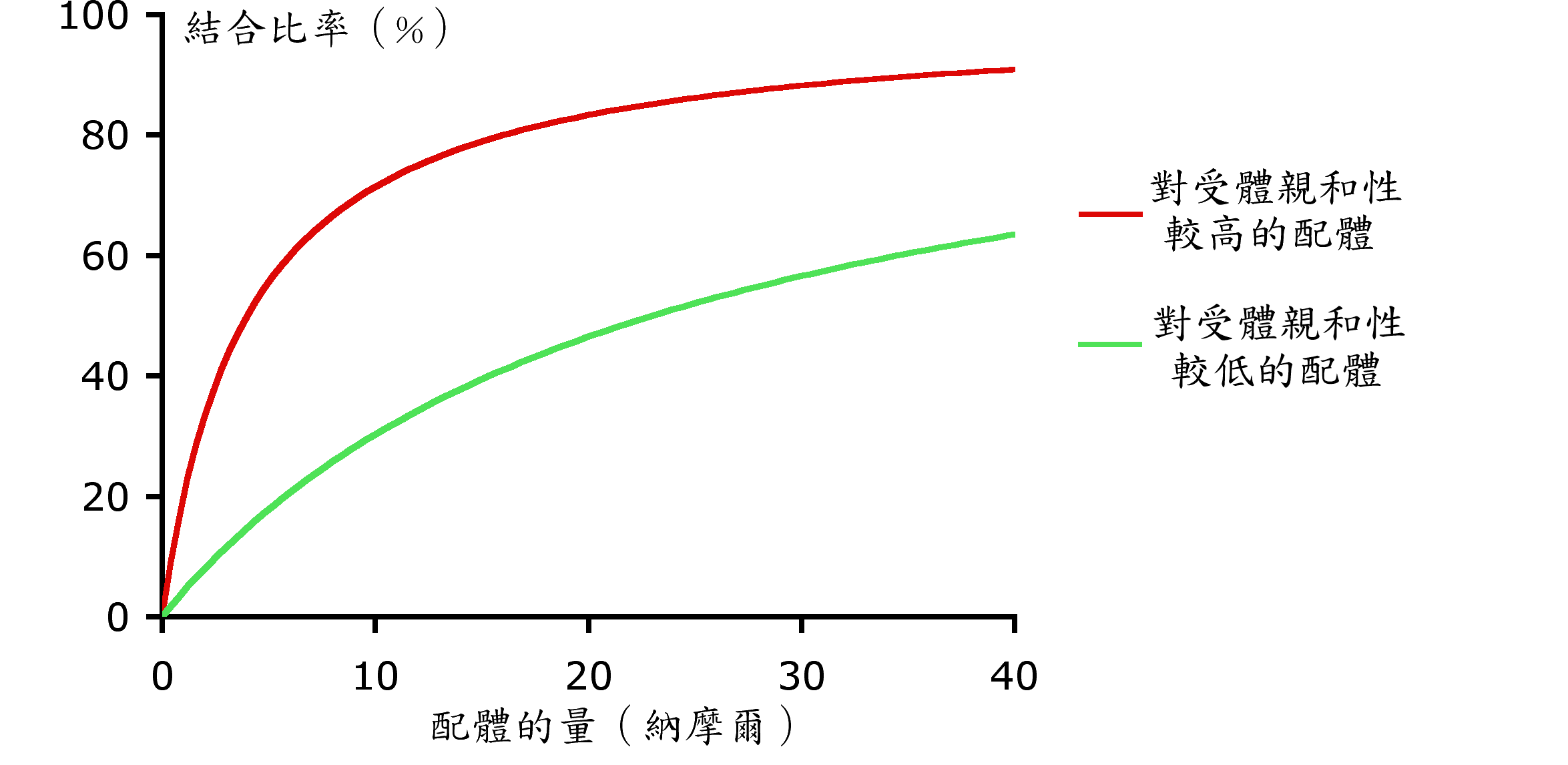 不同激動劑的效果圖